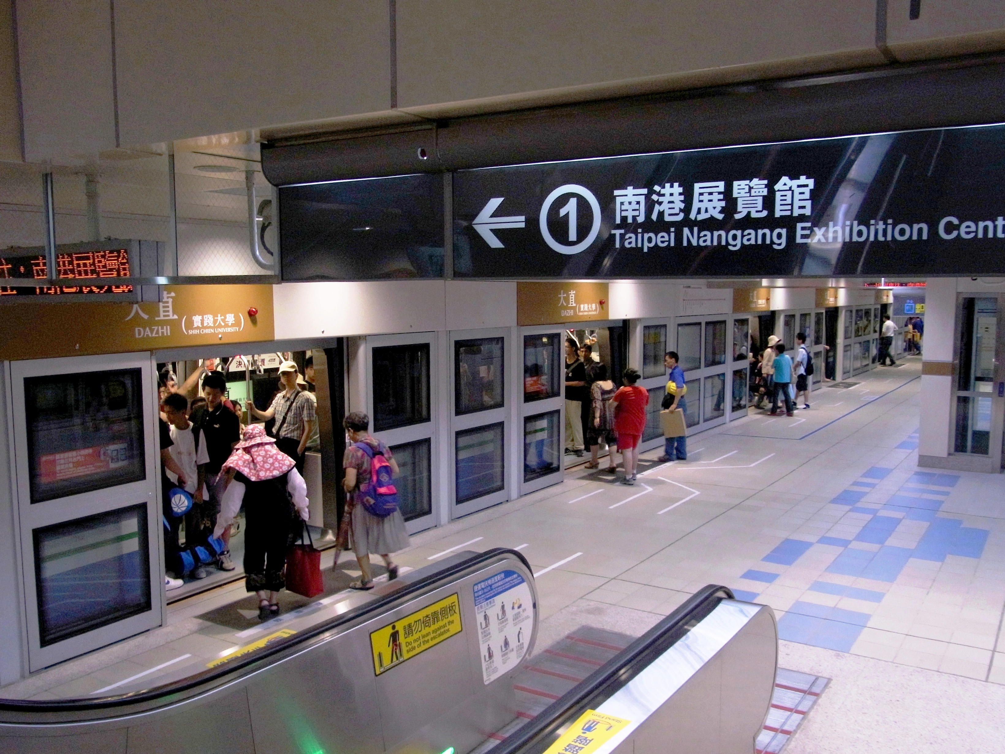 臺北捷運內湖線大直站月臺，月臺閘門採全高式。